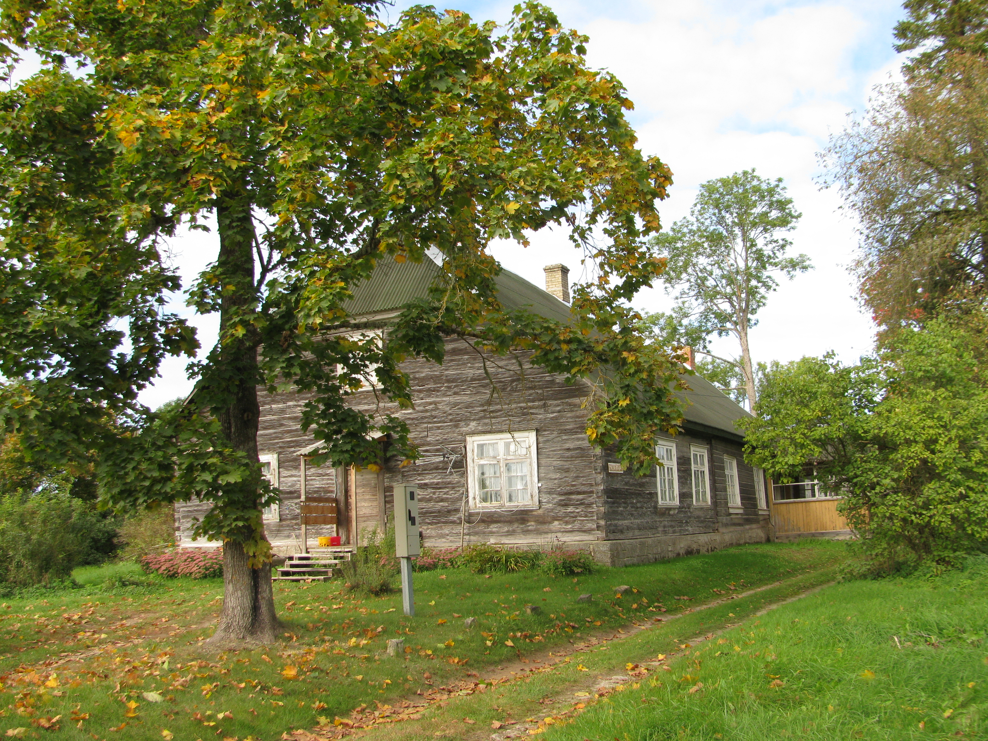 Gaujienas mācītājmuižas apbūve, Gaujienas pagasts